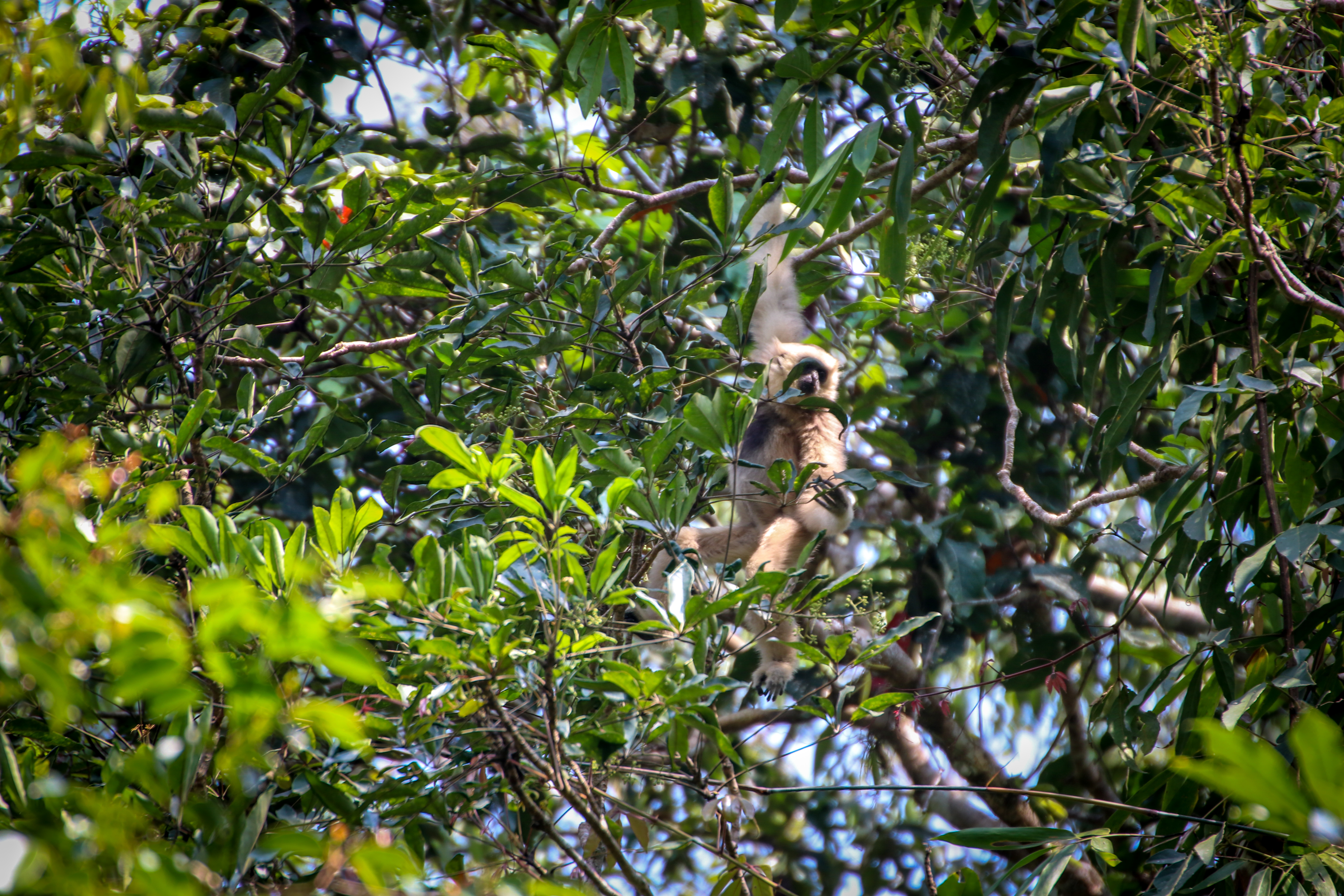 Wonderful wild life Endanger animal Crowned gibbon climbing on the tree